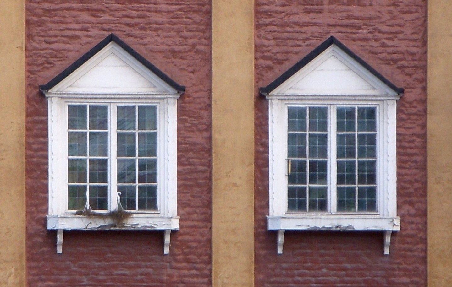 Bostadshus i kvarteret Framtiden 1, Nynäsvägen 307-315, arkitekt Cyrillus Johansson